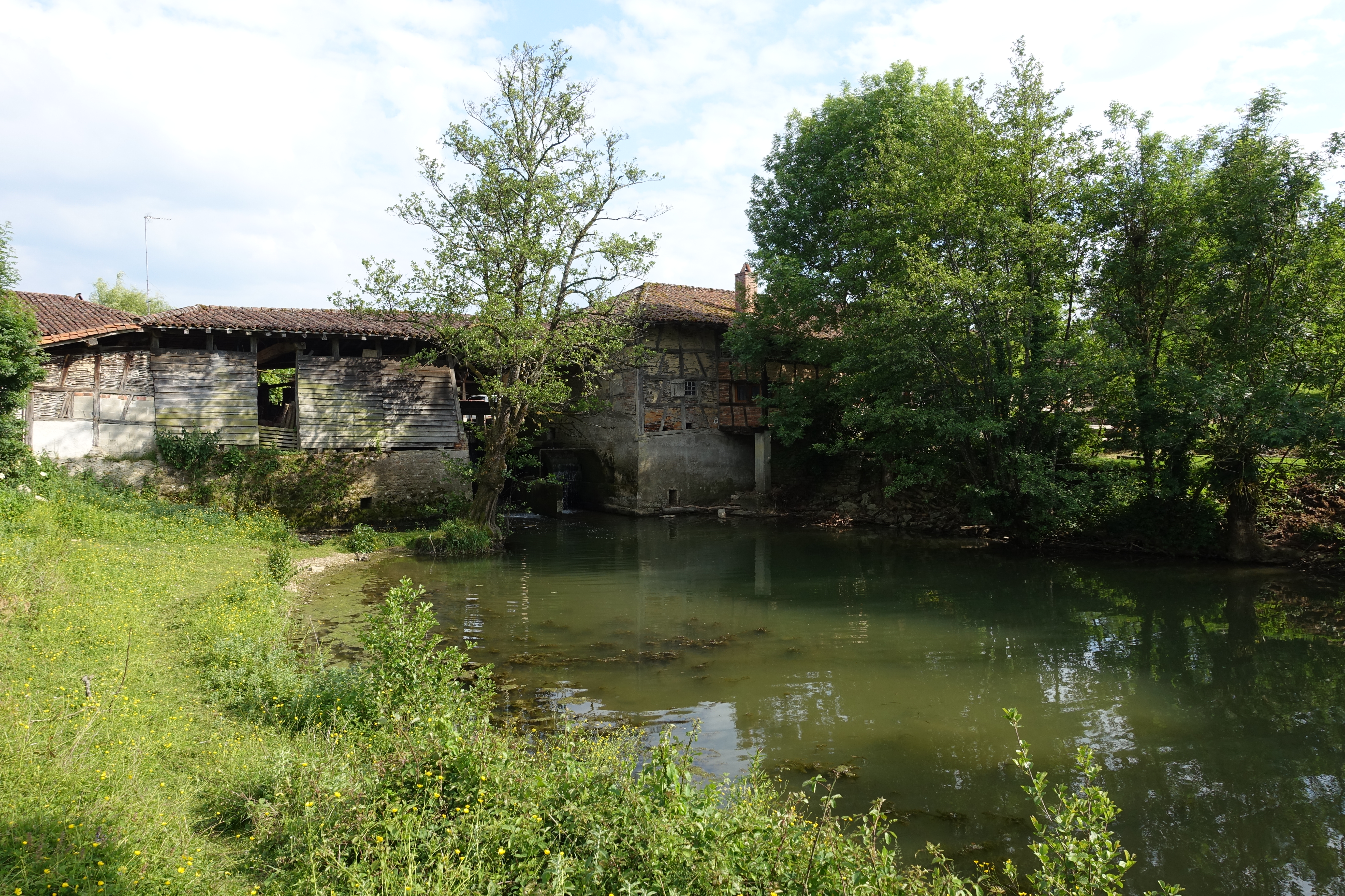 Moulin à eau, dit moulin de Marmont, sur le Sevron à Bény